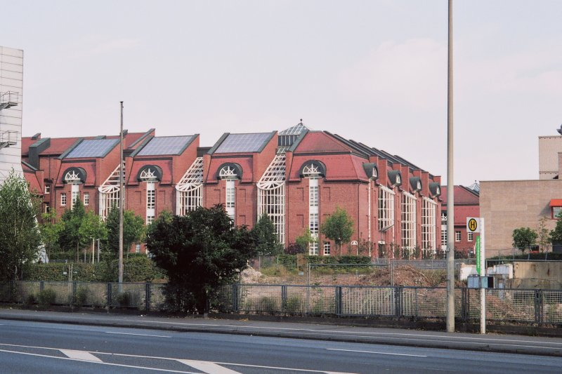 Universitätsbibliothek Kassel von Südosten mit Photovoltaikanlage